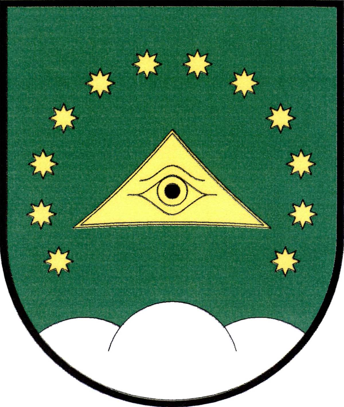 Znak obce Svébohov.